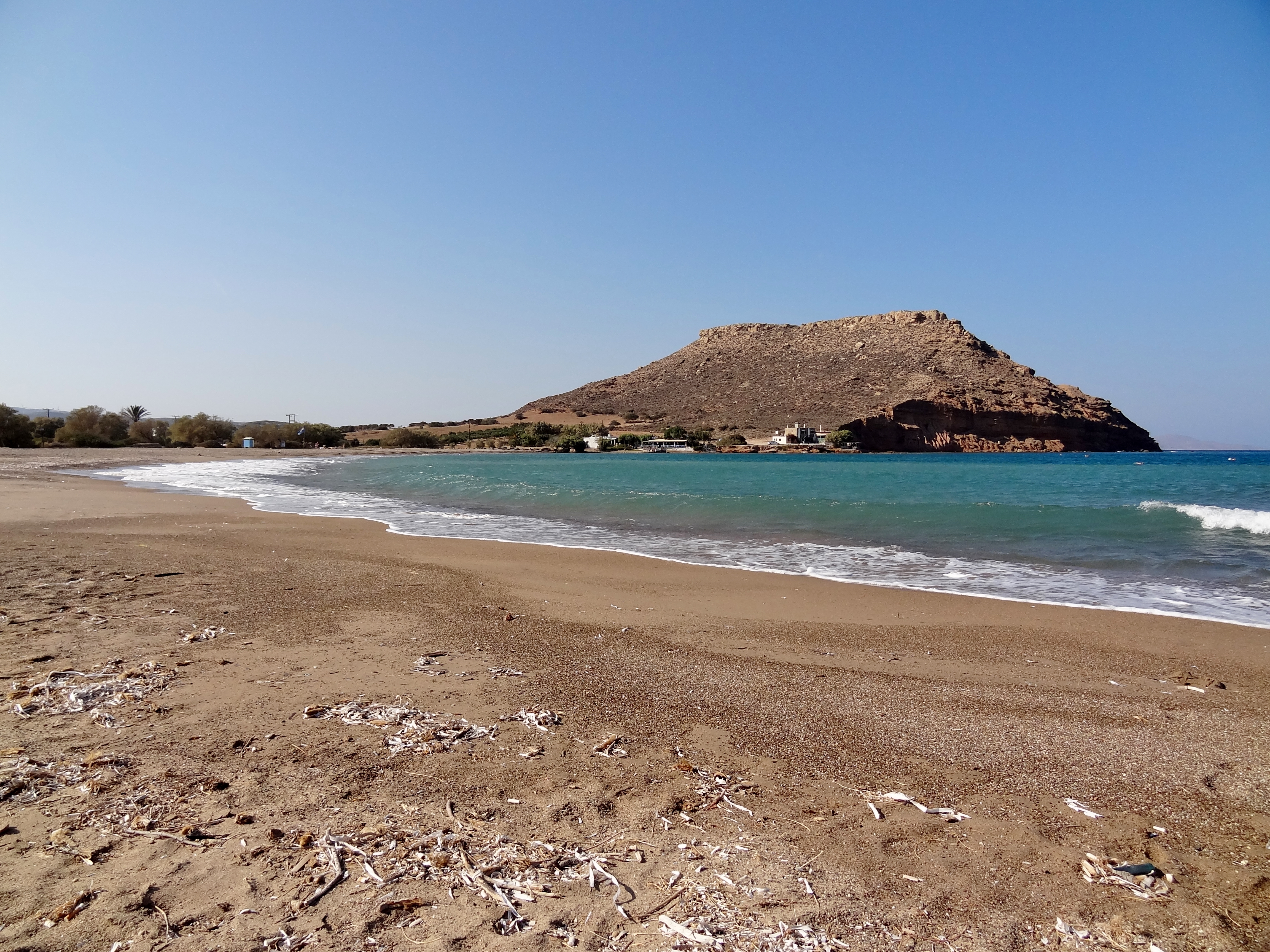 Strand von Chiona (Παραλία Χιόνα) bei Palekasto, Gemeinde Sitia, Kreta, Griechenland